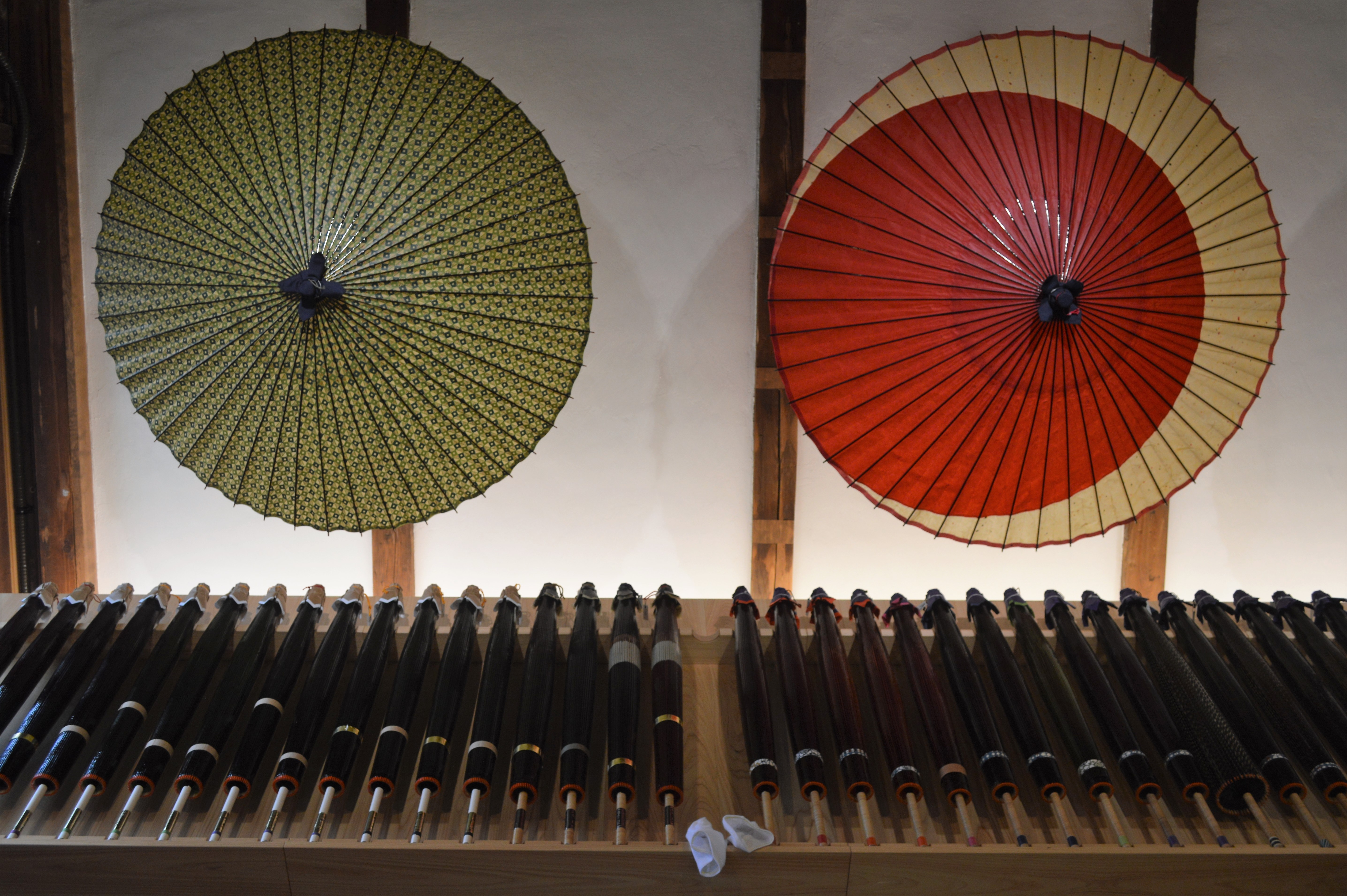 岐阜和傘（加納和傘）。「長良川てしごと町屋CASA」にて。